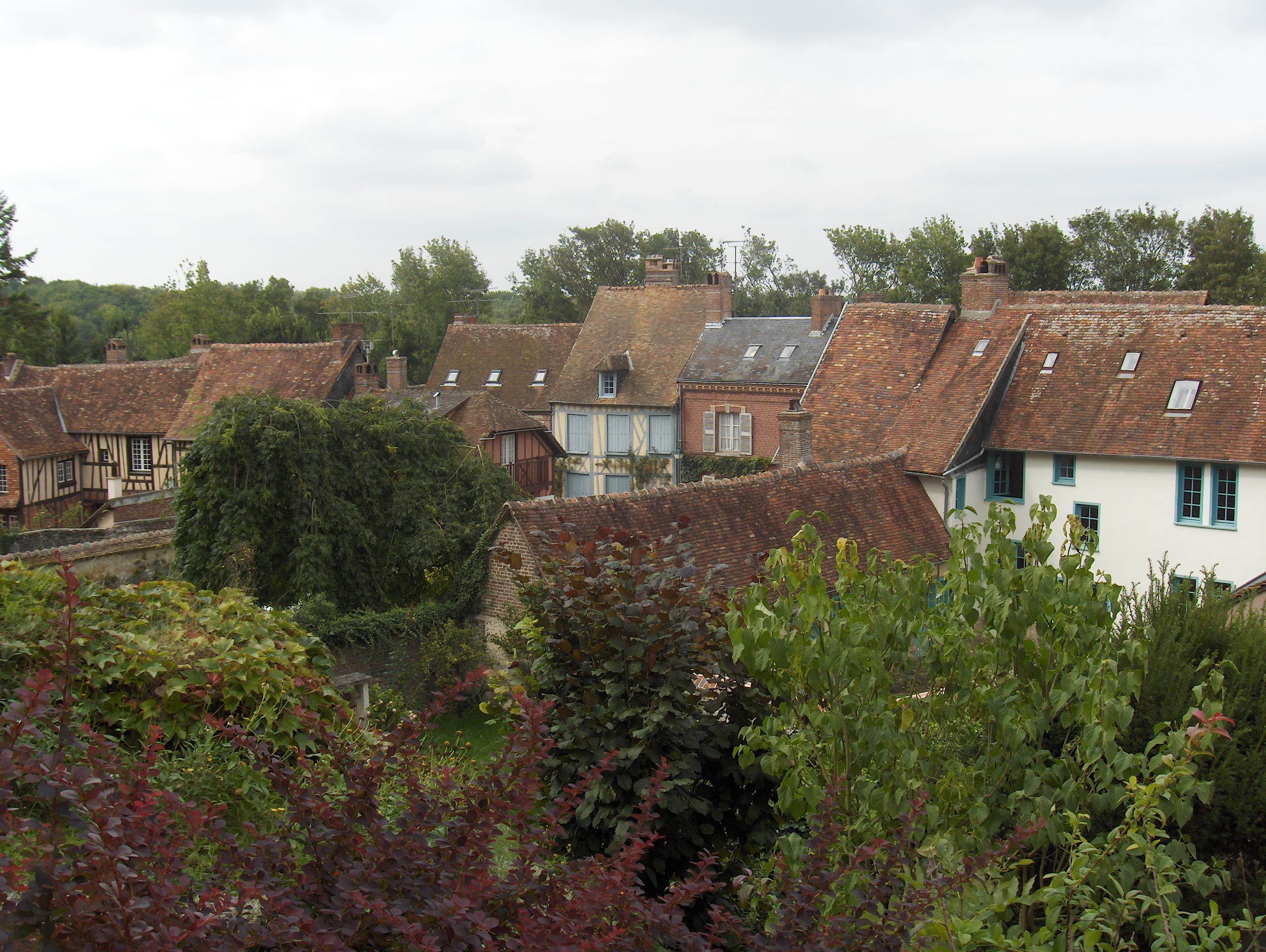 Les toits de Gerberoy dans l'Oise (Picardie)